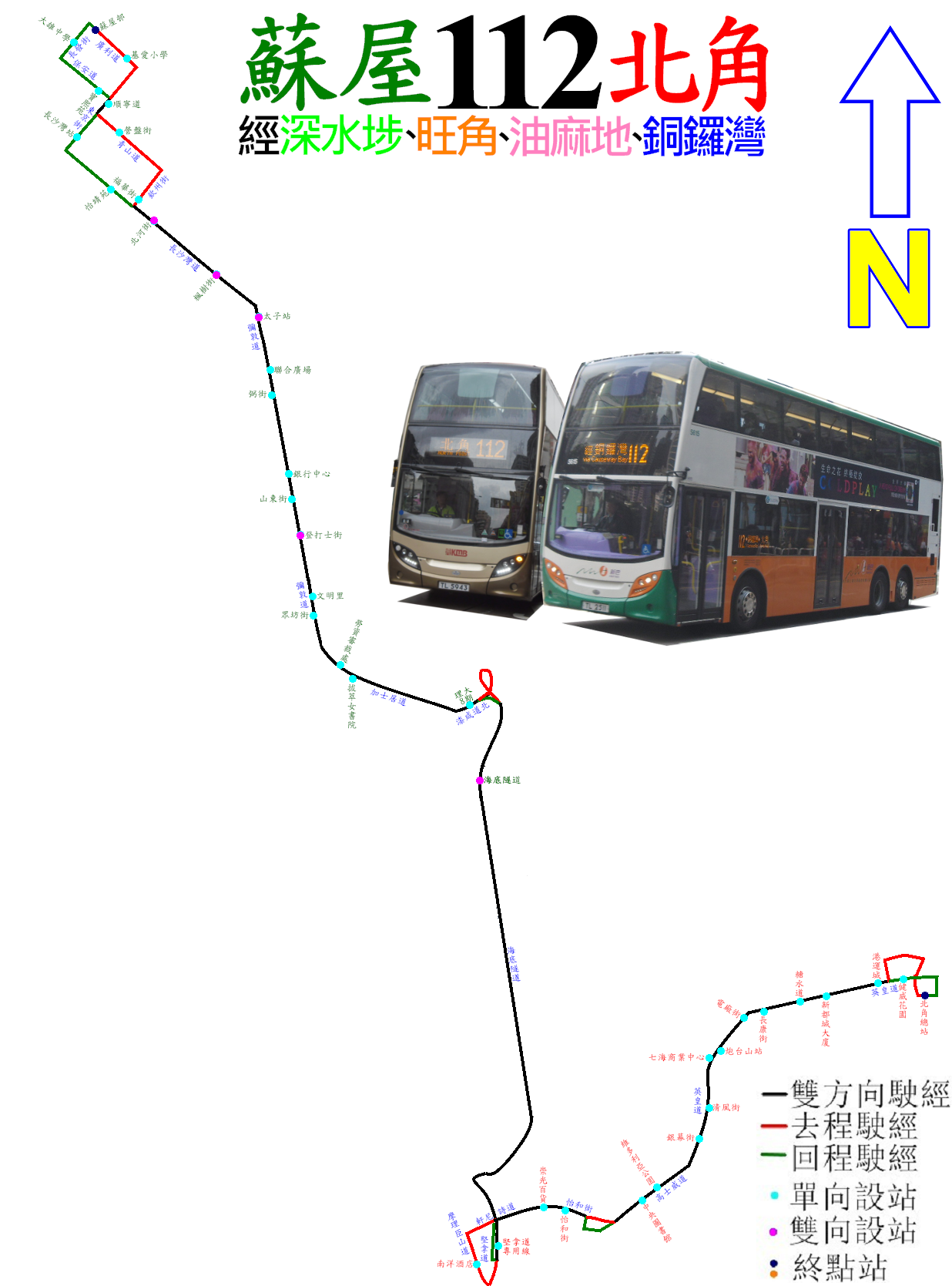 中文（香港）: 過海隧巴112線的走線圖